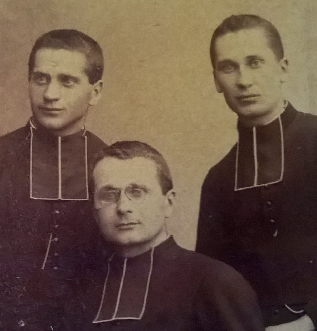 Les abbés Cyprien, Denis et Adrien Barbe